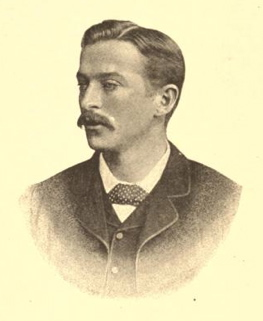 Ион Кит Фальконер